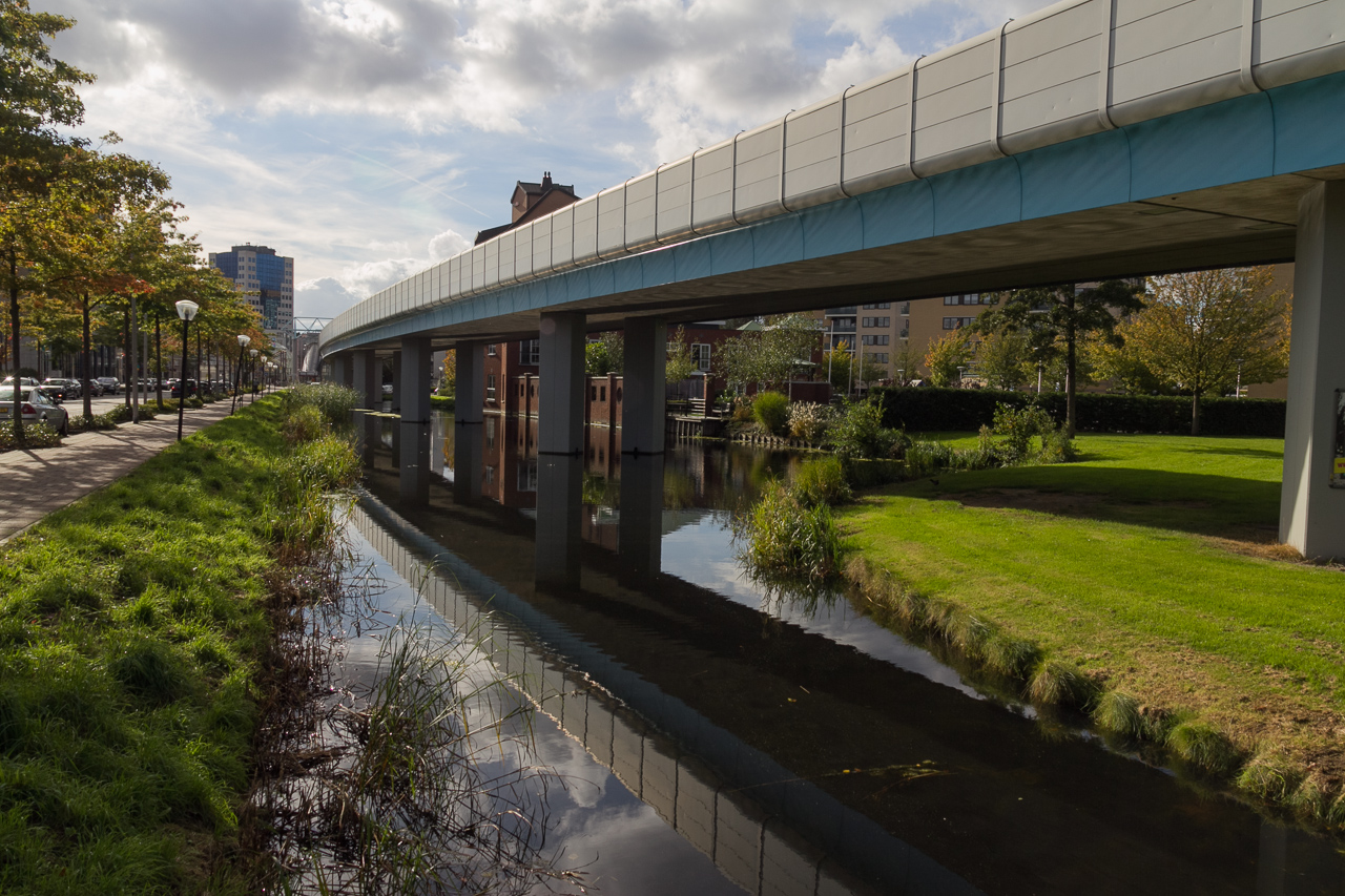 Metrobaan Duikerlaan